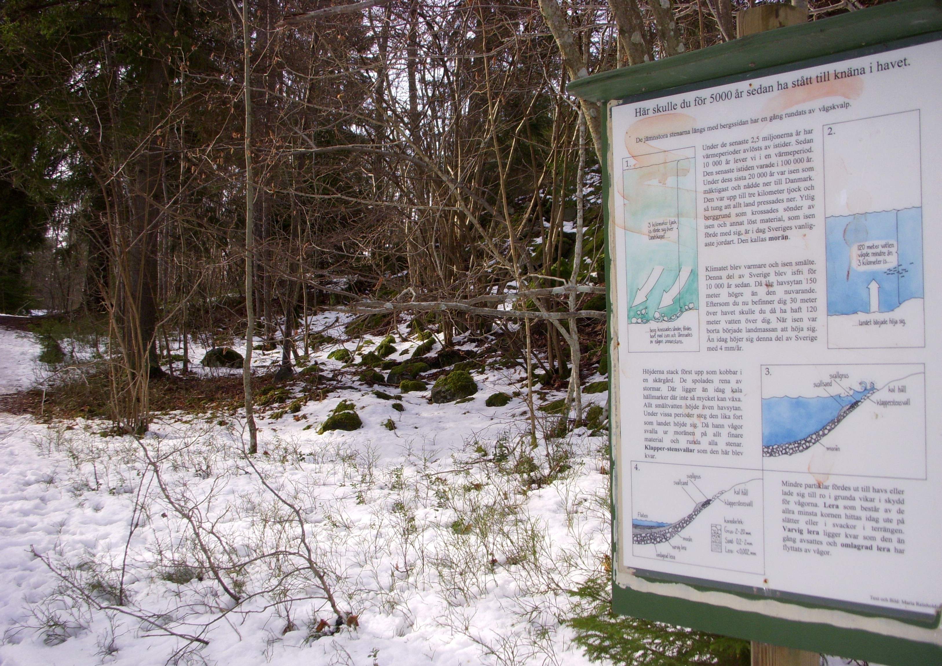 Ett klapperstensfält från istiden i Flatens naturreservat